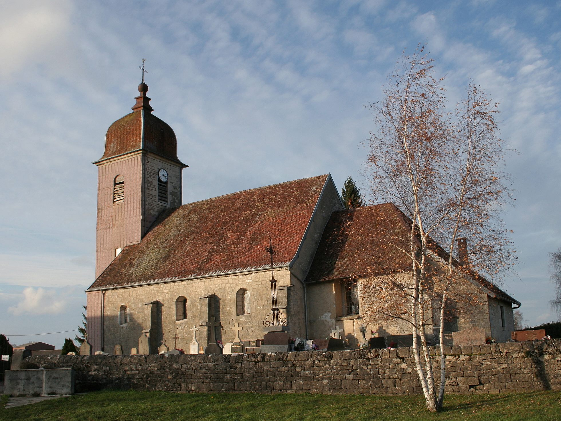 Loulle 39 France church 3 dec 2006 photo by Jean-François Gaffard Jeffdelonge